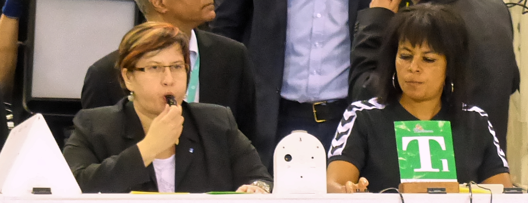 Temps mort posé sur la table de marque lors d'un match de handball.